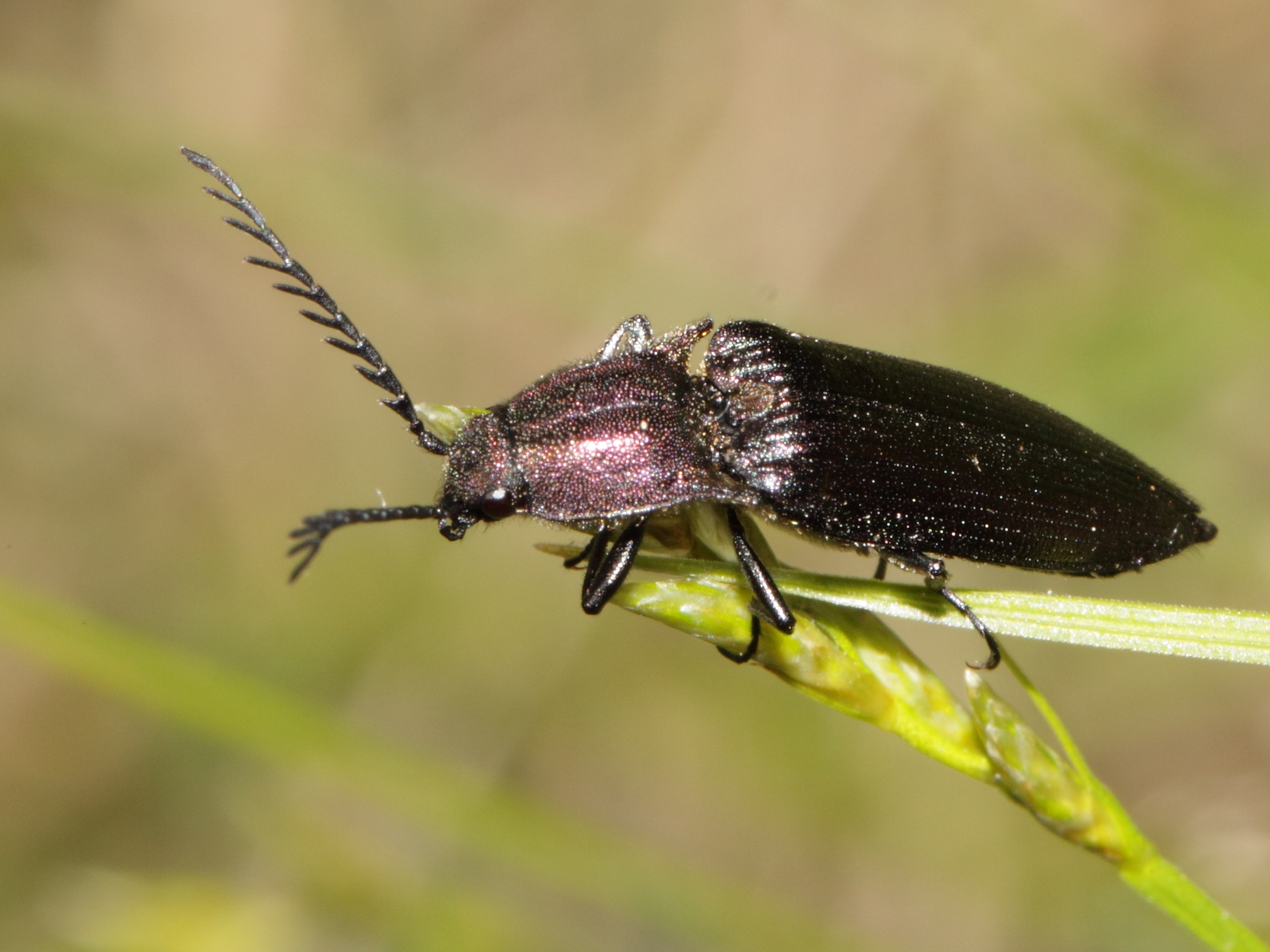 Subfamily: Dendrometrinae GISTEL, 1856 [Syn.: Ctenicerinae (Rindenschnellkäfer)] Tribus: Prosternini GISTEL, 1856 Genus: Ctenicera (Kammhorn-Schnellkäfer) Ctenicera cuprea FABRICIUS, 1775 (Kupferfarbener Kammhorn-Schnellkäfer) [det. Boris Büche, 2012, based on this photo] more info: SE-Germany, Bavaria, Bayrischer Wald: vic. Spiegelau, 18.05.2012 IMG_0570